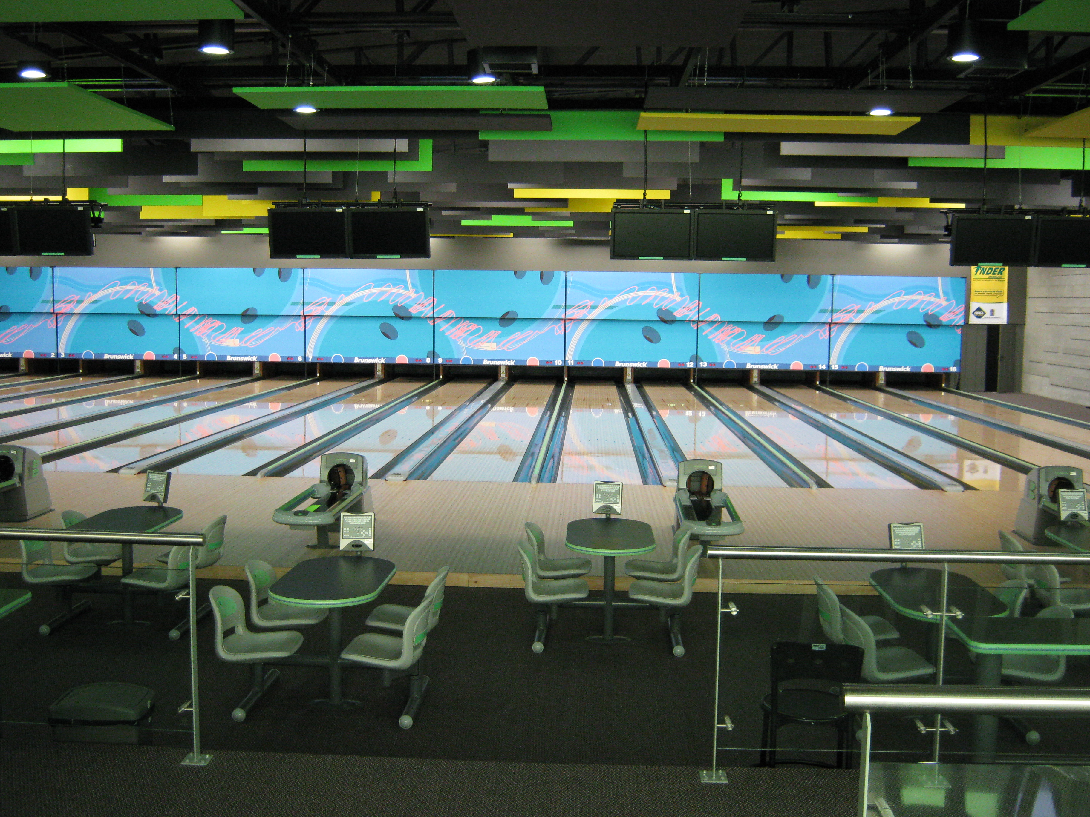 Bolera Municipal de Medellín, Unidad deportiva de Belén, Medellín, Colombia.